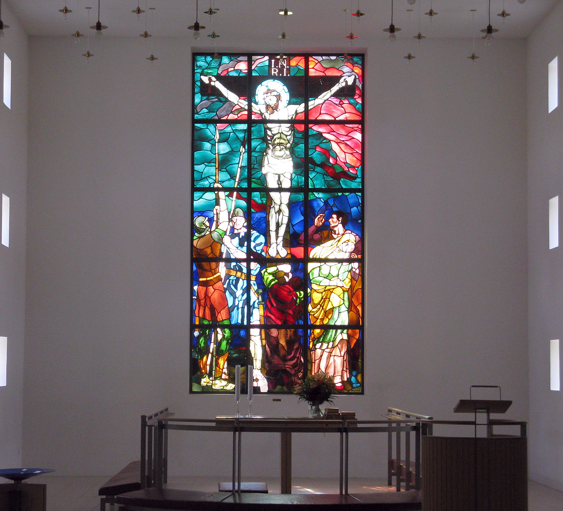 Risskov Kirke, Glasmosaik i østgavl.